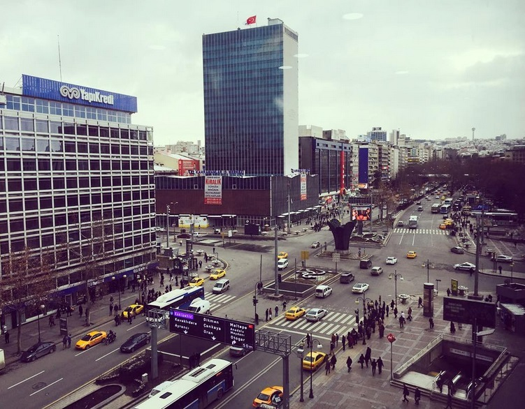 Emek İşhanı ve Kızılay Meydanı'nda resimde görünür olduğu Güvenpark Atatürk Bulvarı istikimati üzerinde